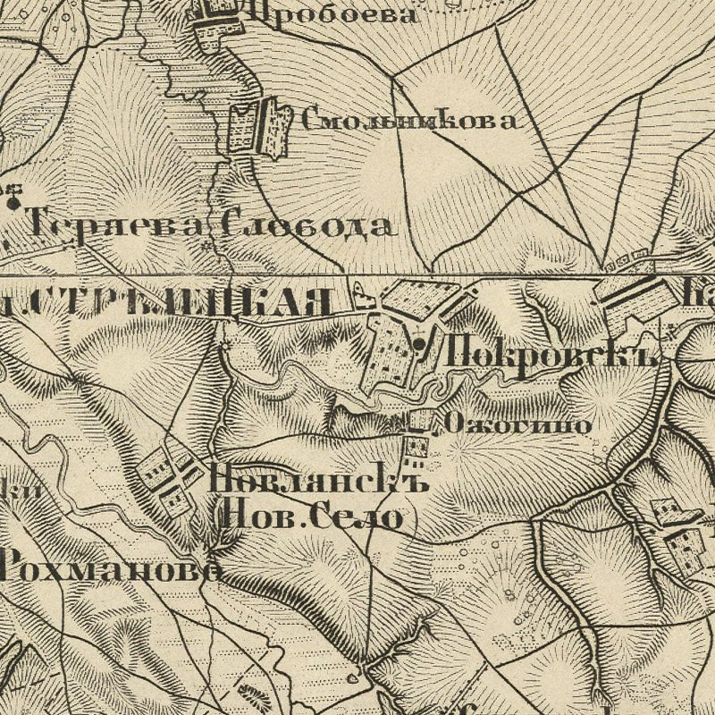 Село Покровское сельского поселения Теряевское Волоколамского района Московской области России на карте Ф. Ф. Шуберта